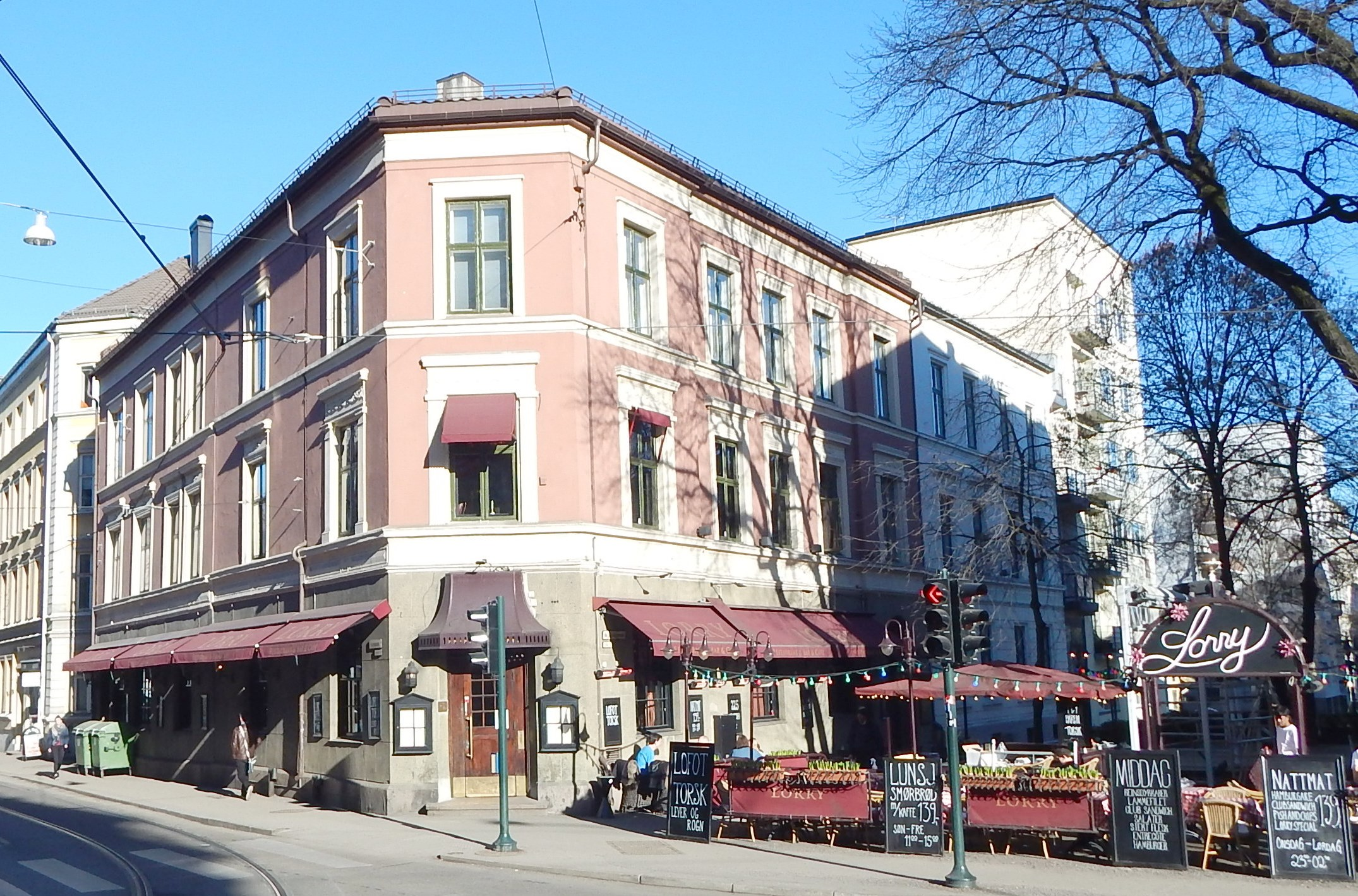 Parkveien 12